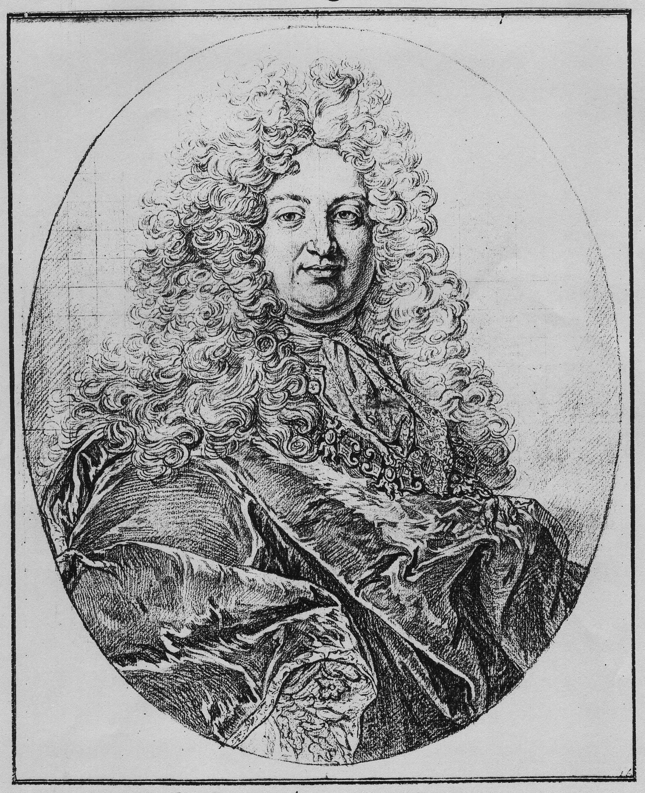 Joseph Philippe Ludwig Wenzel von Sinsendorf